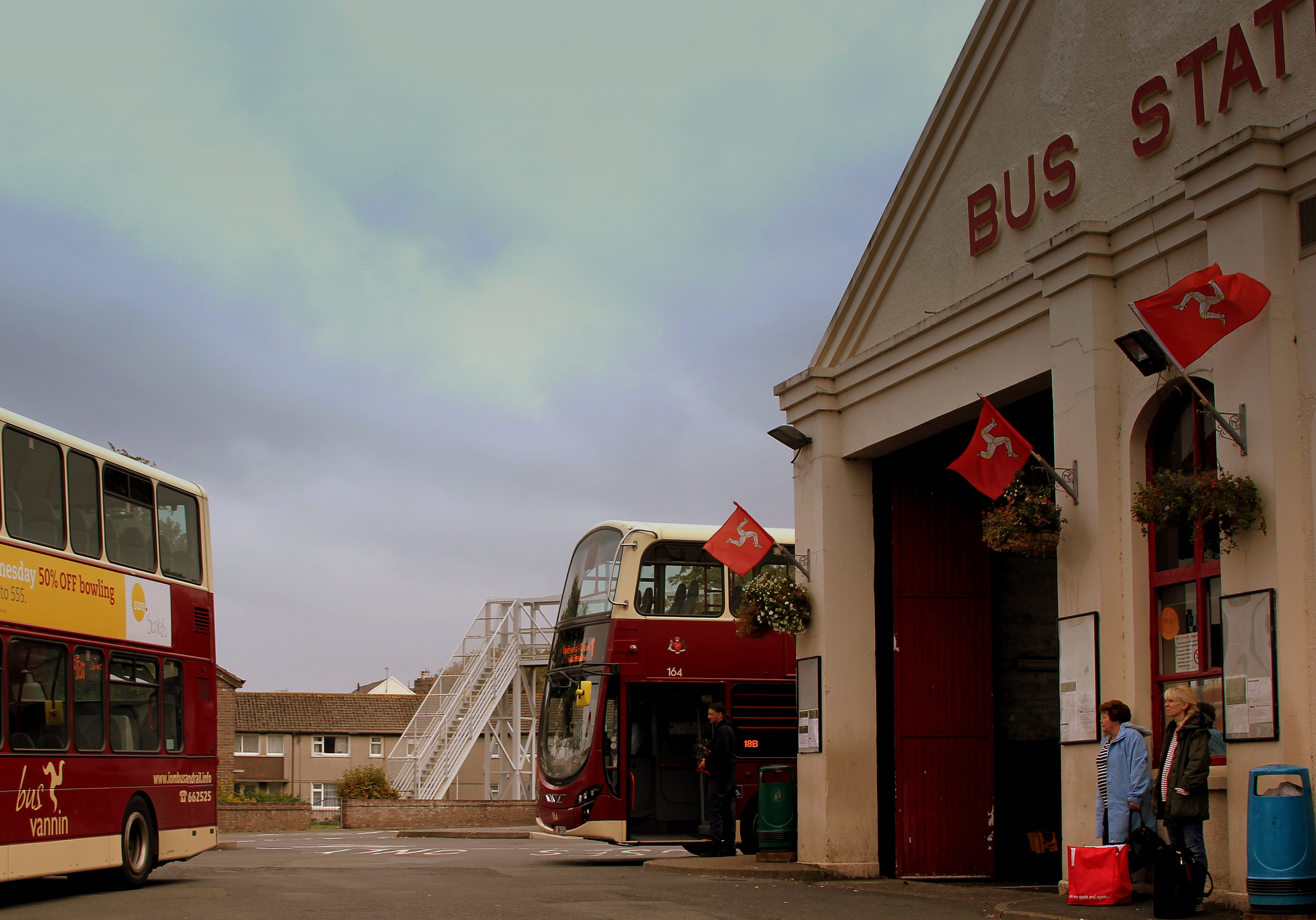 BUSVANNIN WRIGHTBUS GEMINI II,S AT RAMSEY BUS STATION ISLE OF MAN SEP 2014